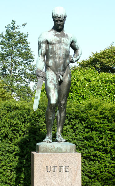 Statue af Uffe Hin Spage i Kolding Foto: Christian Rossen